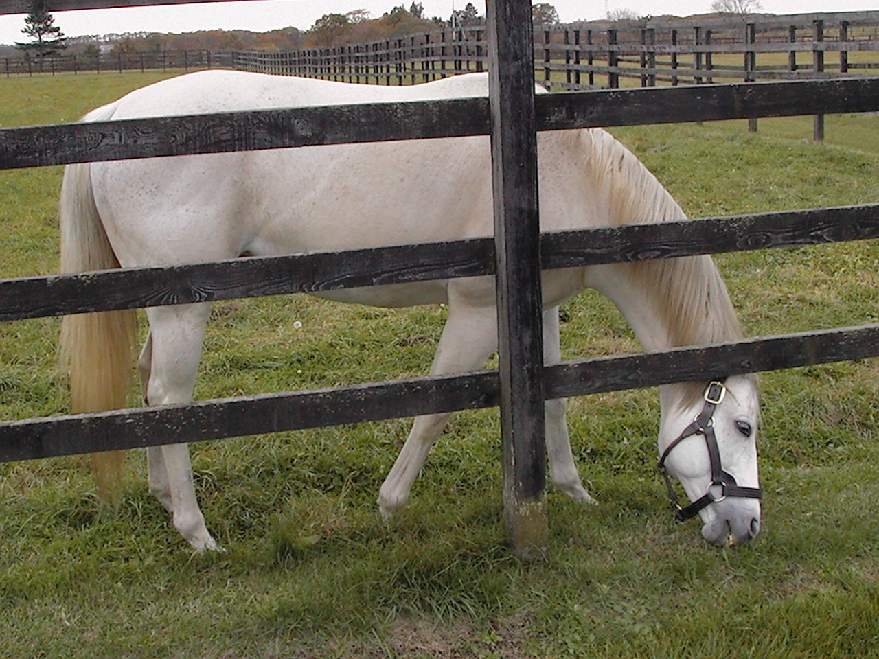 牧場見学にて撮影